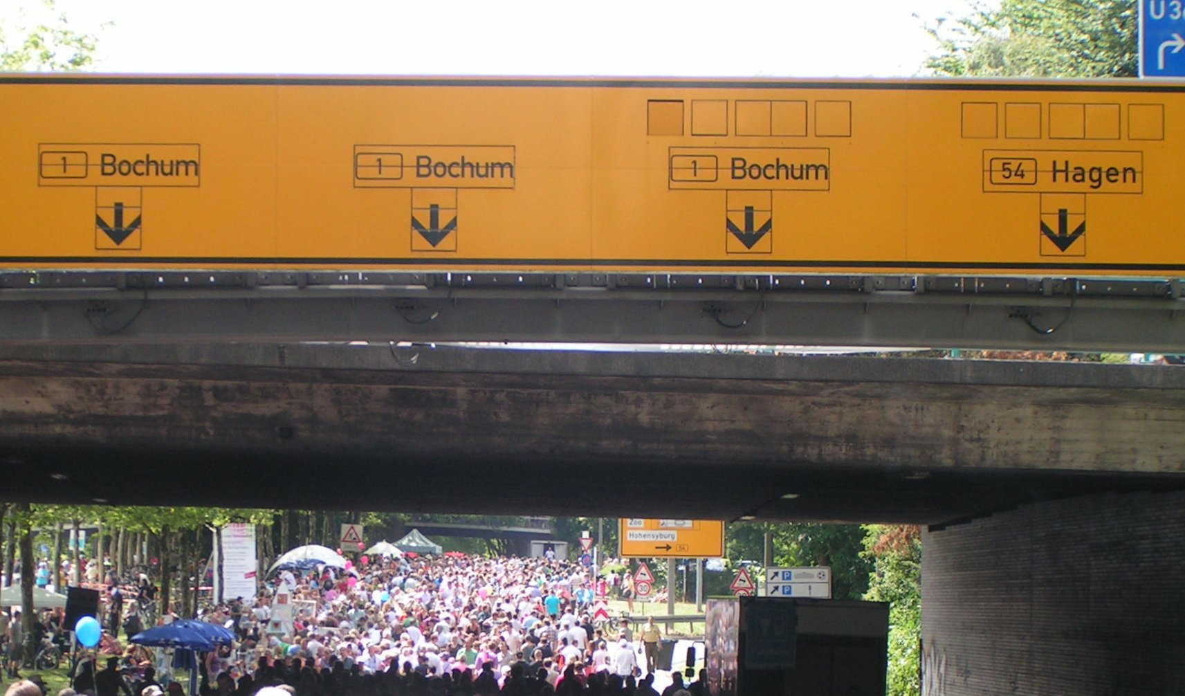 Still-Leben Ruhrschnellweg 2010. Standort: Abzweigung der B 54 von der B 1 in Dortmund (Nordspur)